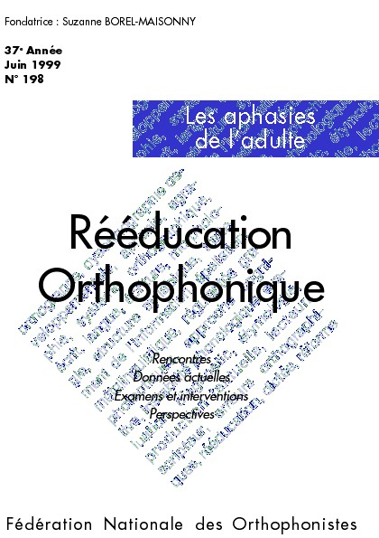 couverture rééducation orthophonique 1999